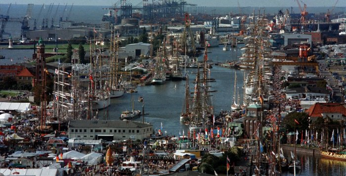 Sail 2000 in Bremerhaven Bild der Sail 2000 vom Radarturm in Bremerhaven